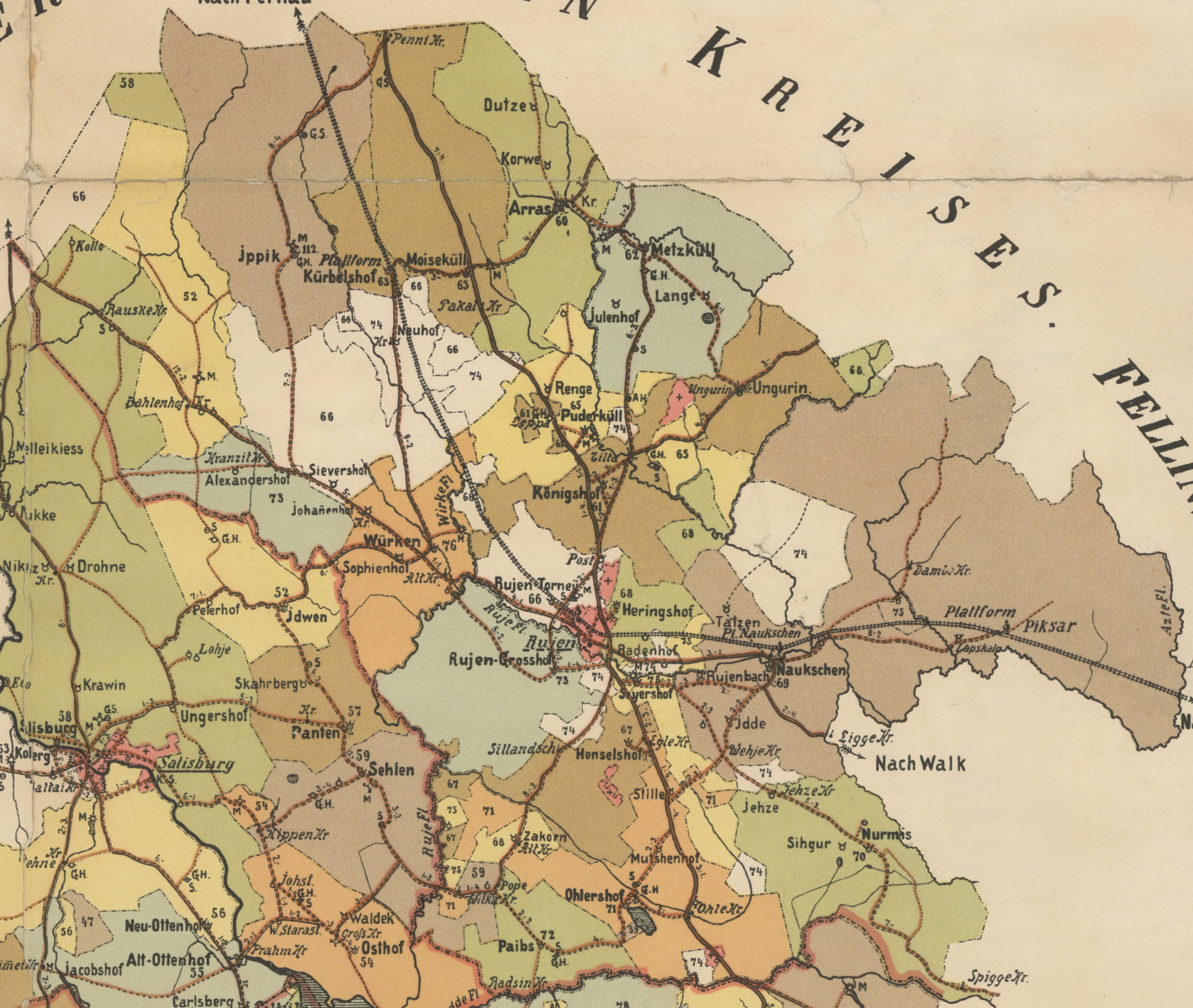 Ruhja kihelkonna mõisad 1903. aastal.